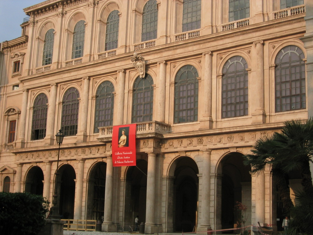 Fassade des "Palazzo Barberini" in Rom.